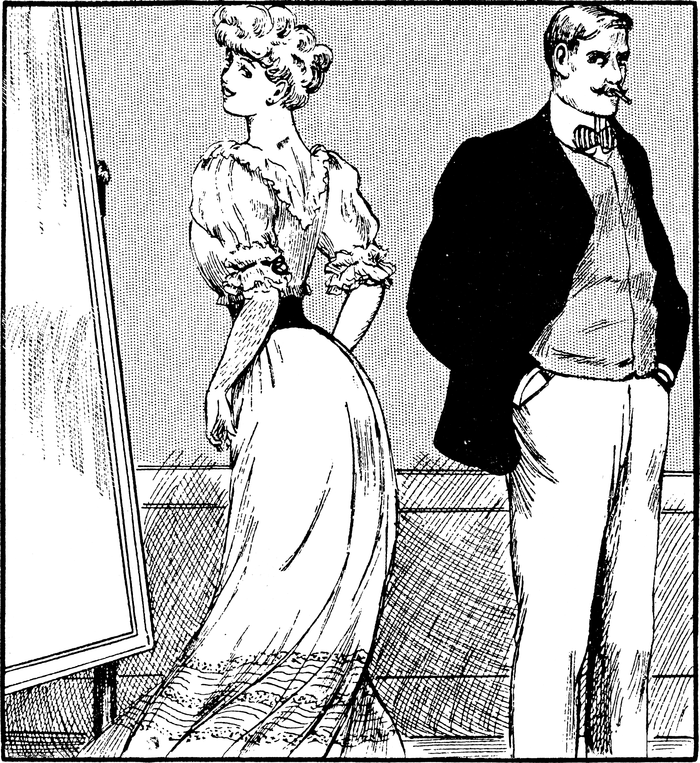 PRÉPARATIFS DE DÉPART — Oh! un rien, mon cher : quelques petits costumes pour la mer. — Oui! des petits costumes salés.